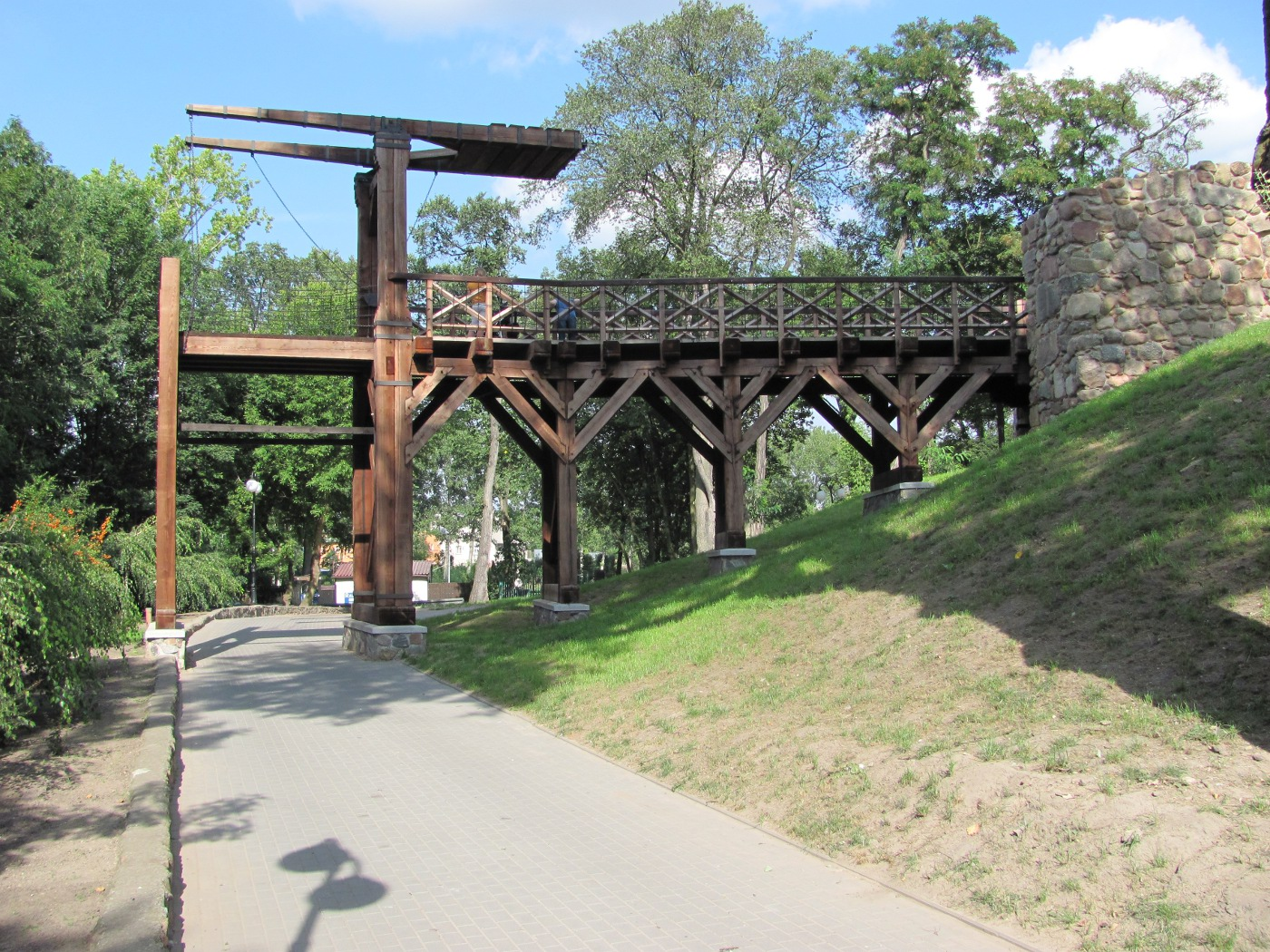 Kruszwica - most zwodzony przy Mysiej Wieży